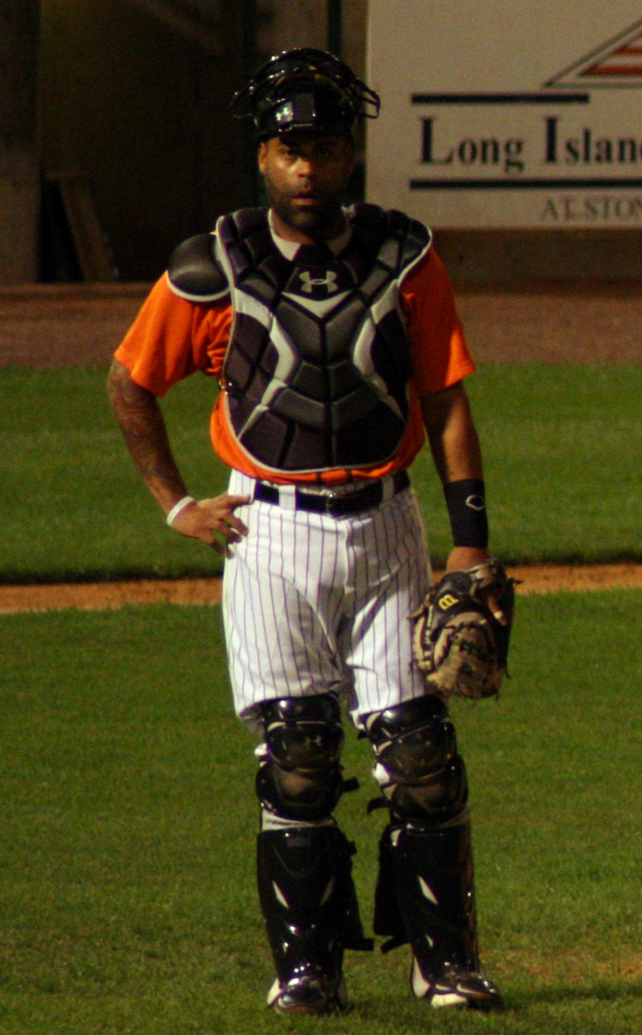 Ramón Castro